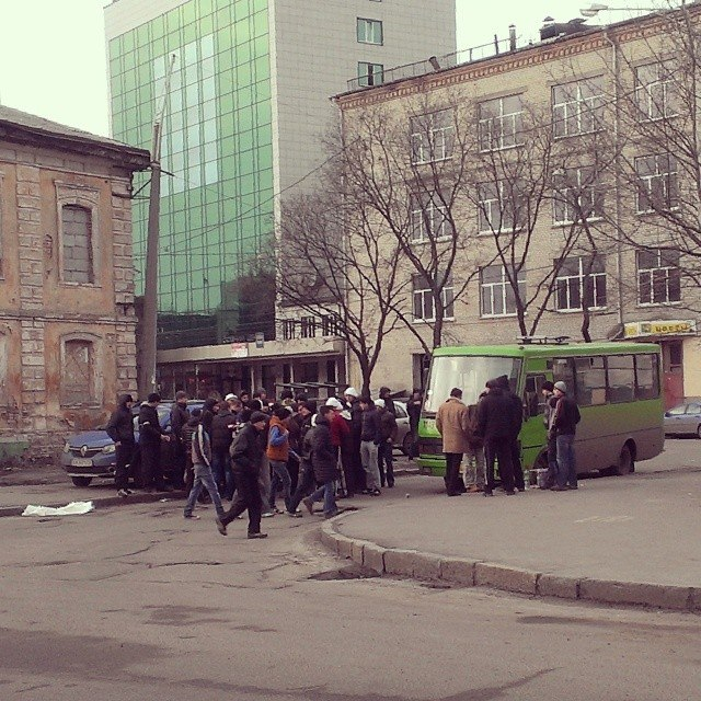 Тітушки збираються поруч із Кінним ринком між вулицями Богдана Хмельницького та Шота Руставелі. Дія відбувалась під час того, як активісти Євромайдана не пускали до Києва старшокурсників Академії внутрішніх військ Міністерства внутрішніх справ України.